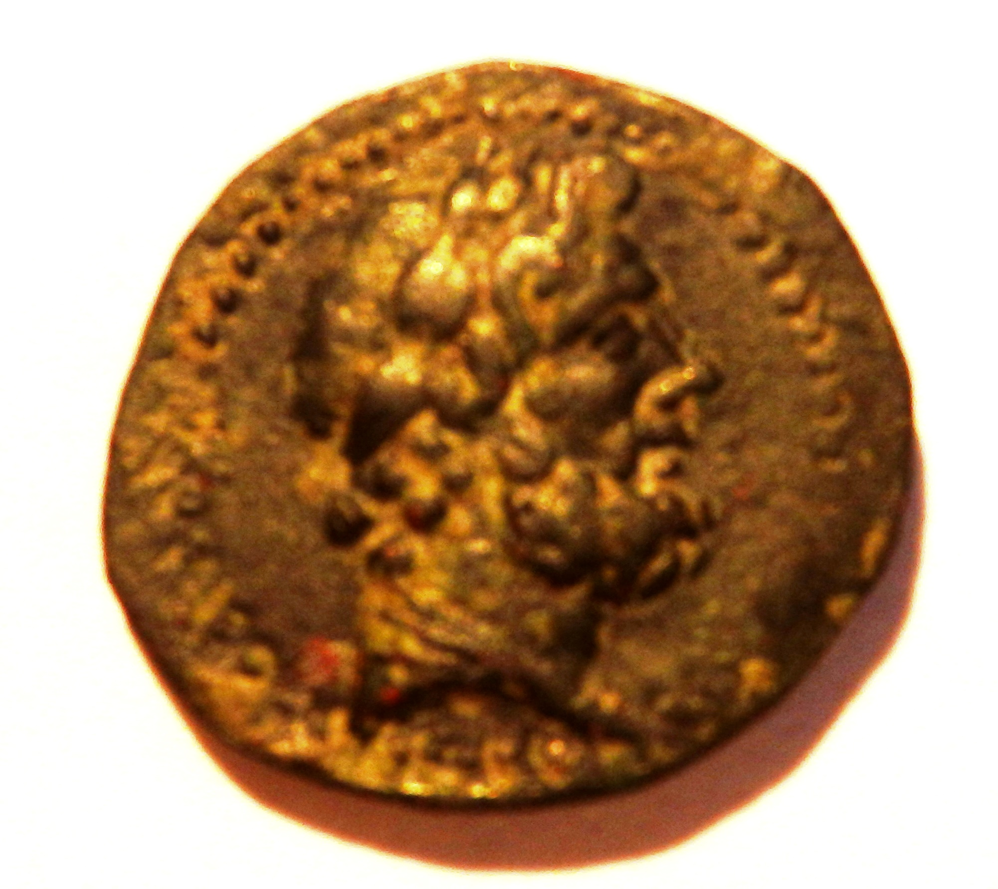 Vorderseite Bronzemünze Mopsos mit Zeuskopf, BMC 2f